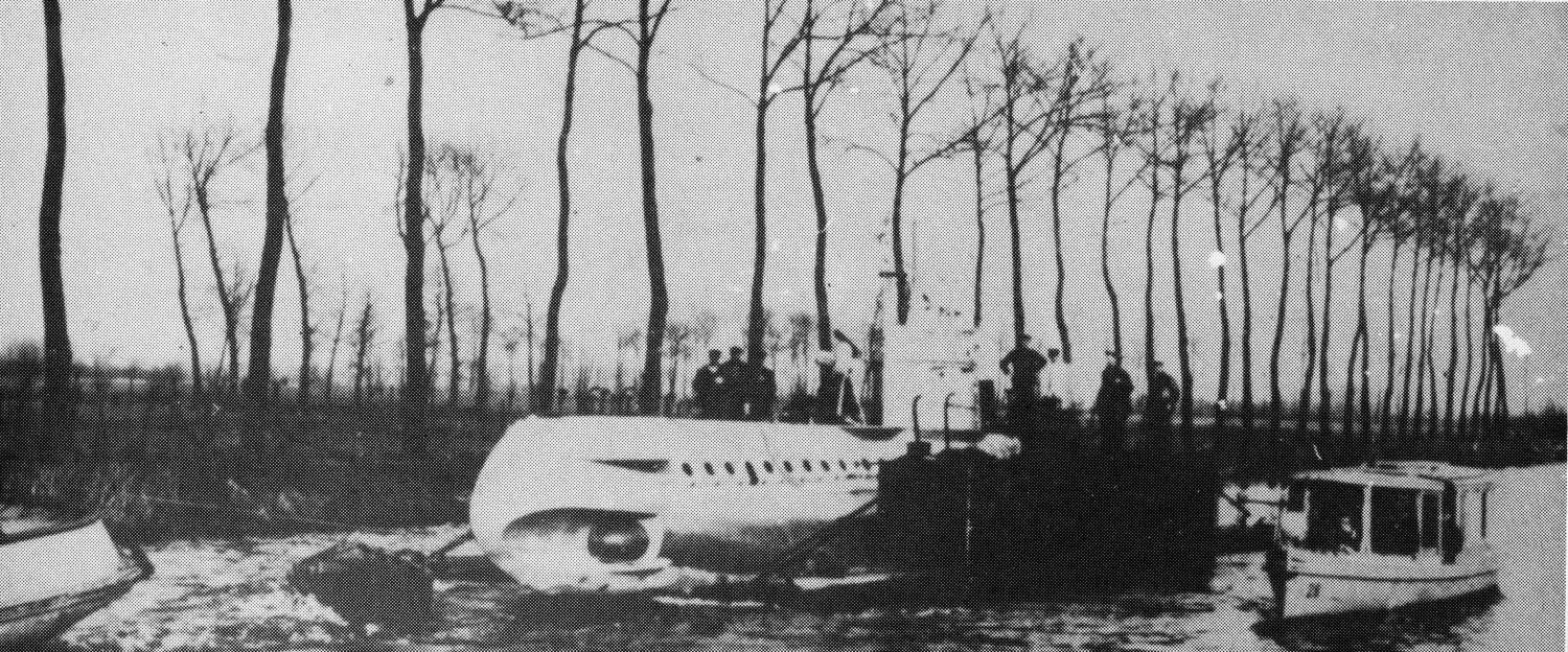 SM UB-6 auf dem Weg zur Küste im belgischen Kanalsystem auf einem Ponton von Antwerpen nach Zeebrugge